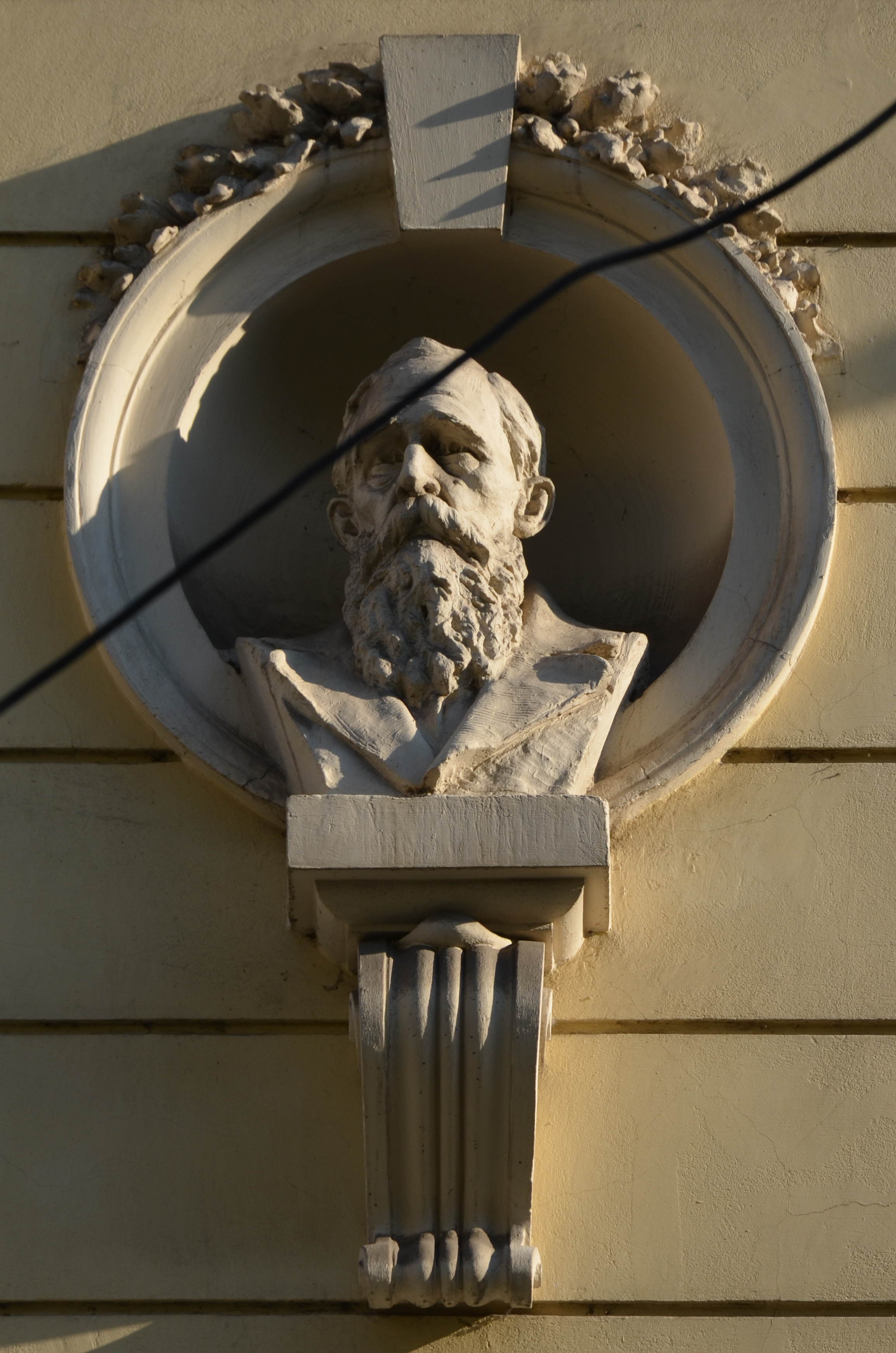 Будинок № 1 на вулиці Беринди у Львові. Теракотове погруддя Юзефа Крашевського. Скульптор Пйотр Гарасимович.